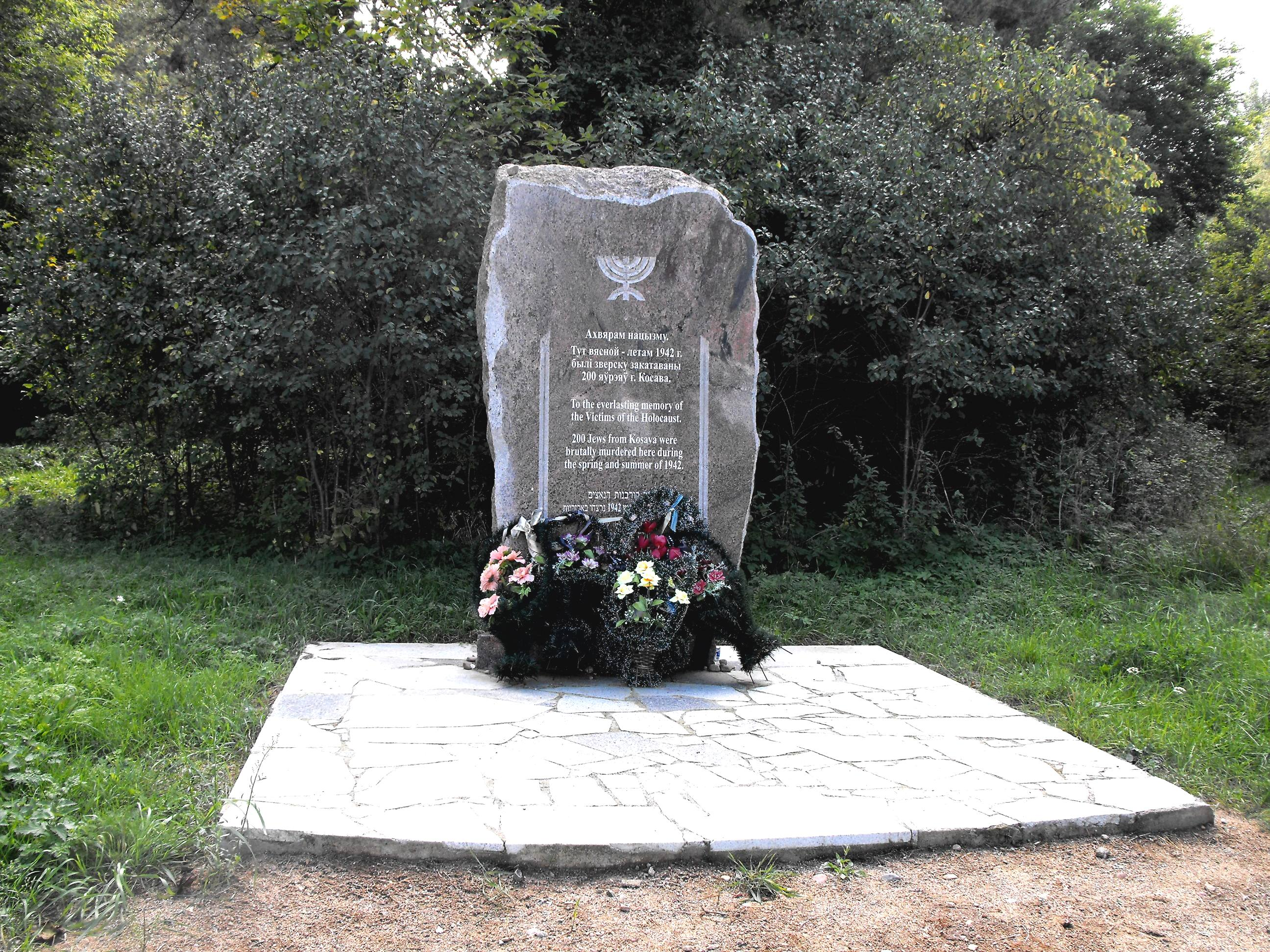 Памятник на одном из мест уничтожения коссовских евреев во время Холокоста в урочище Яловасто на окраине Коссово. Памятник расположен ближе к дороге, а не на самом месте убийства.